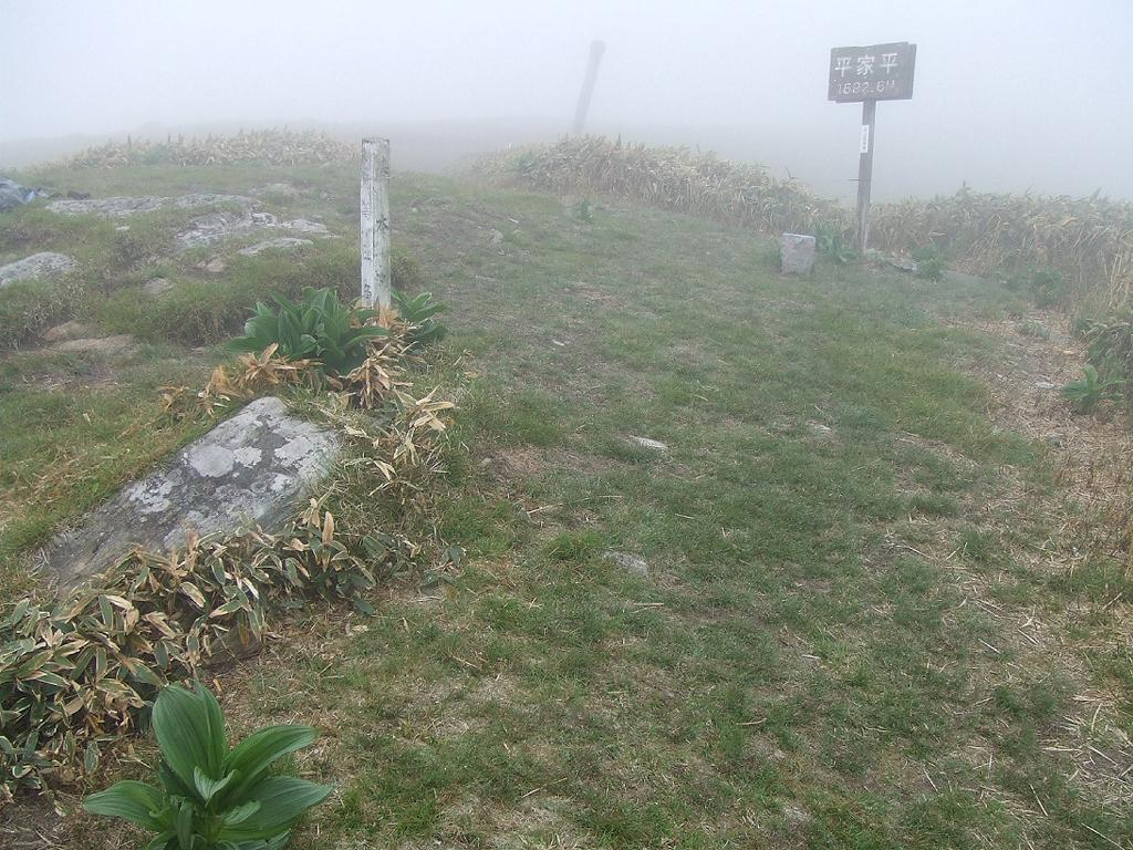 平家平の頂上